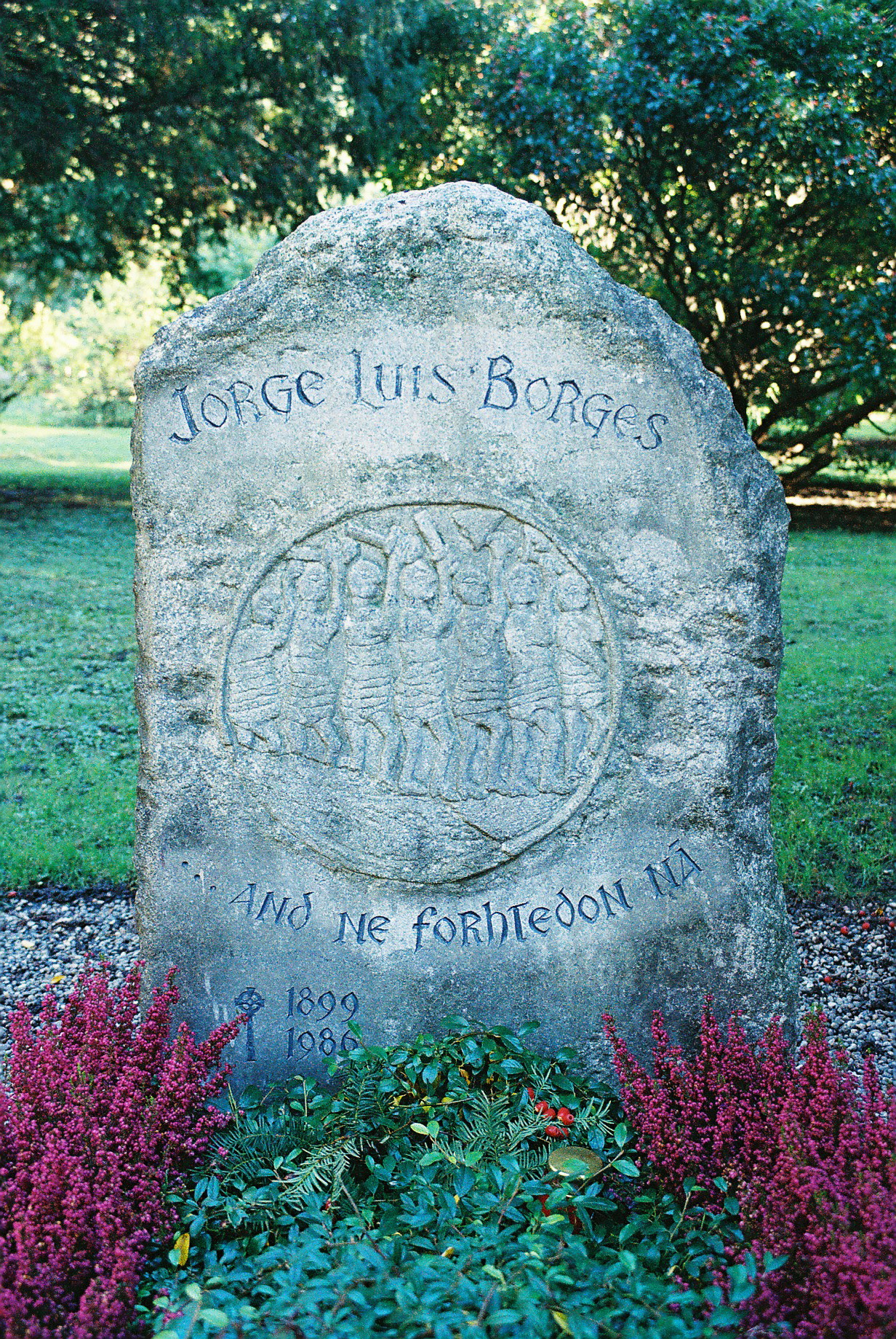 Tumba de Jorge Luis Borges en el Cimetière des Rois en Ginebra, Suiza